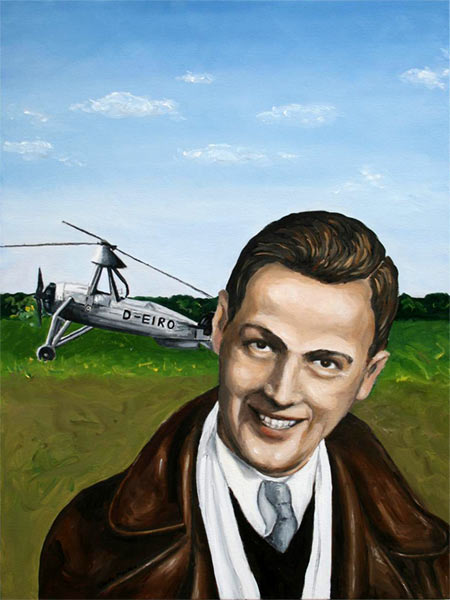 Flugpionier Werner Altrogge vor einem Drehflügler. Ölgemälde von Christa Murken. Das Gemälde befindet sich als Schenkung der Erschafferin Christa Murken im Hubschraubermuseum Bückeburg.